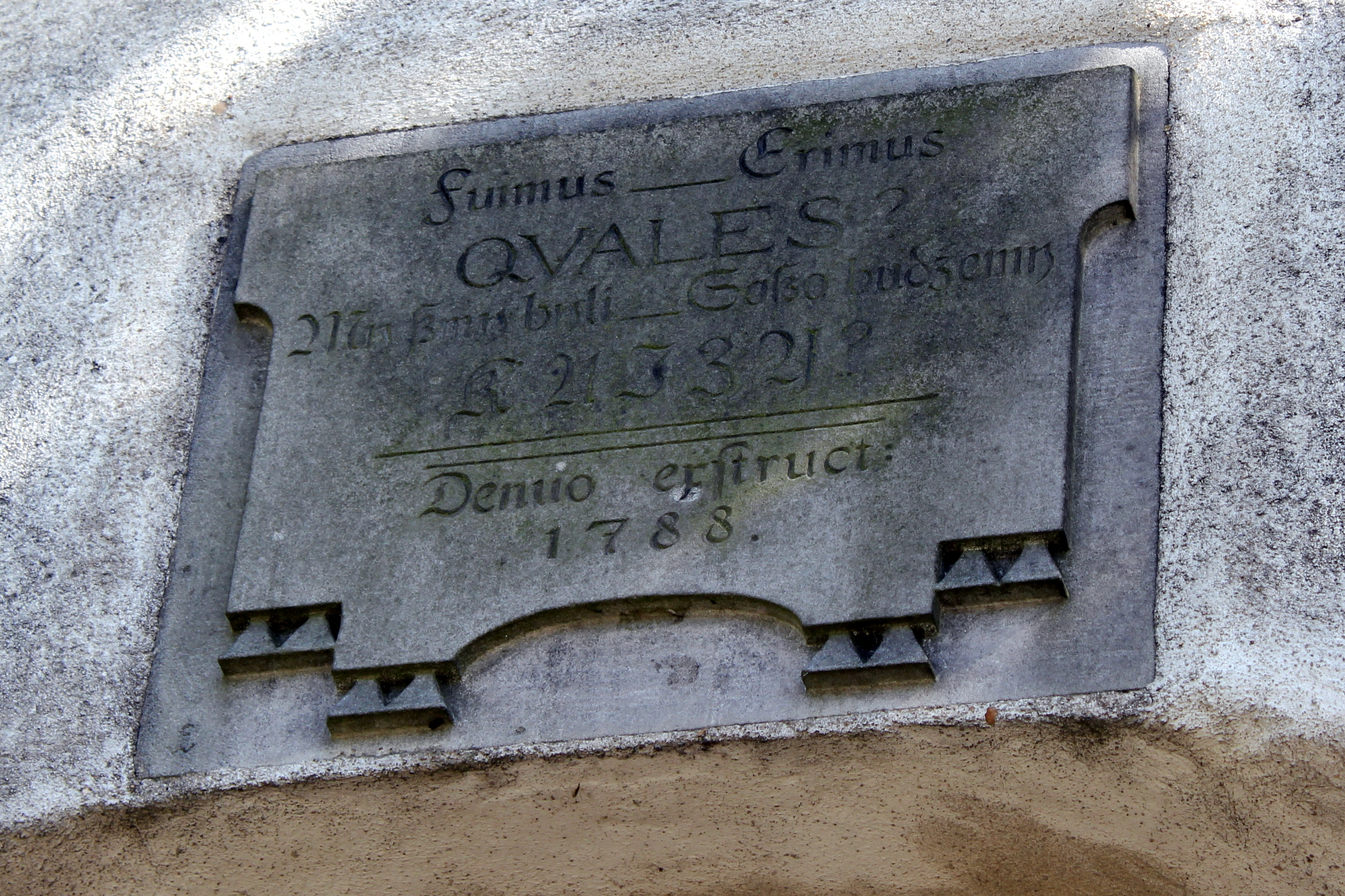 Hornjoserbsce: Malešecy; dwurěčny łaćonsko-serbski napis při kěrchowskich wrotach.